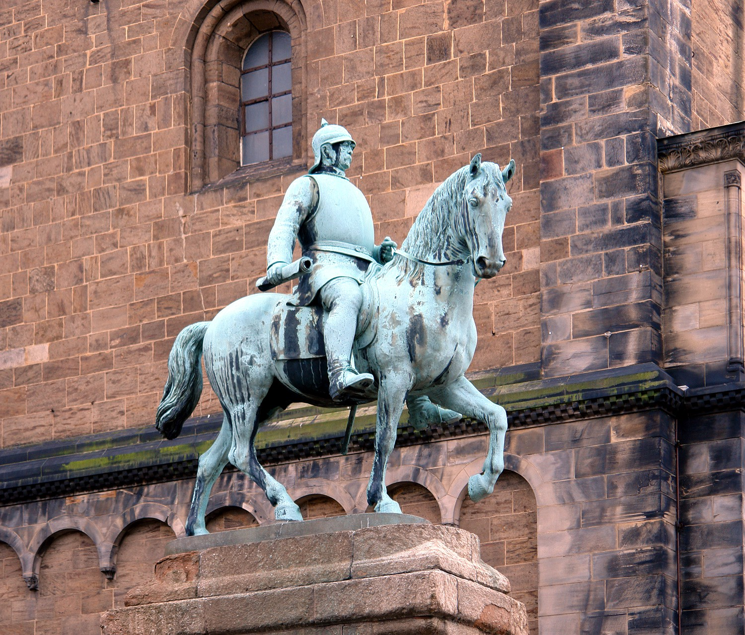 Reiterstandbild Bismarck neben dem Bremer Dom. Entwurf: Adolf von Hildebrand. Enthüllt 1910 Das abgebildete Objekt ist ein geschütztes Kulturdenkmal in der Freien Hansestadt Bremen, mit der Nr. 0055 beim Landesamt für Denkmalpflege registriert.